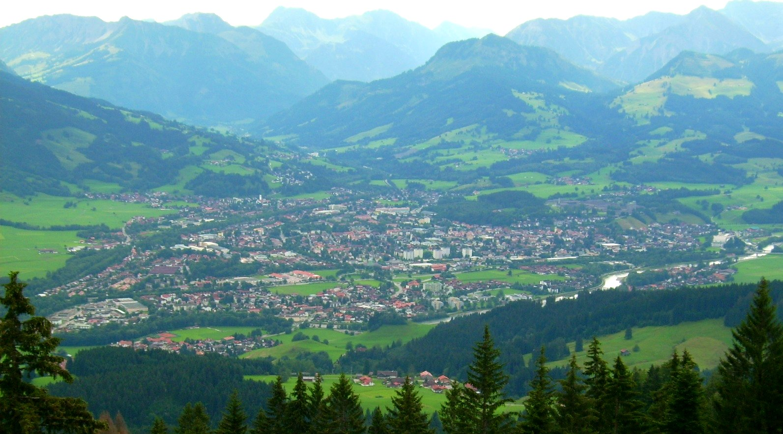 Blick auf Sonthofen vom Mittagberg